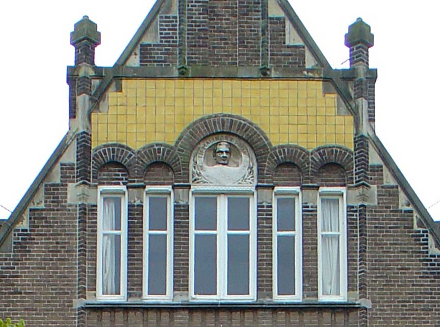 Plaquette stichter P.C.Th. Malingré van het gebouw van de Theodorusstichting Westhaven 33 te Gouda